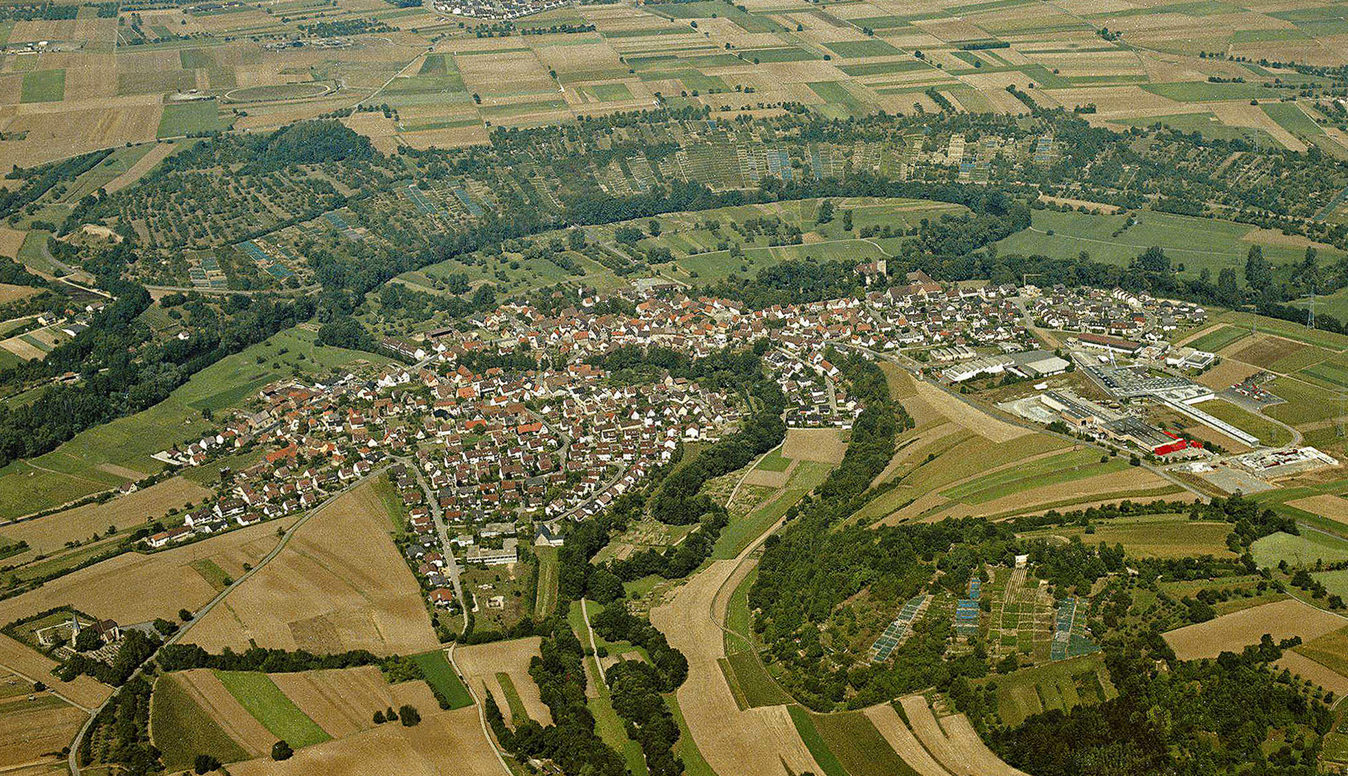 Unterriexingen bei Markgröningen von Süden (Ausschnitt 2)